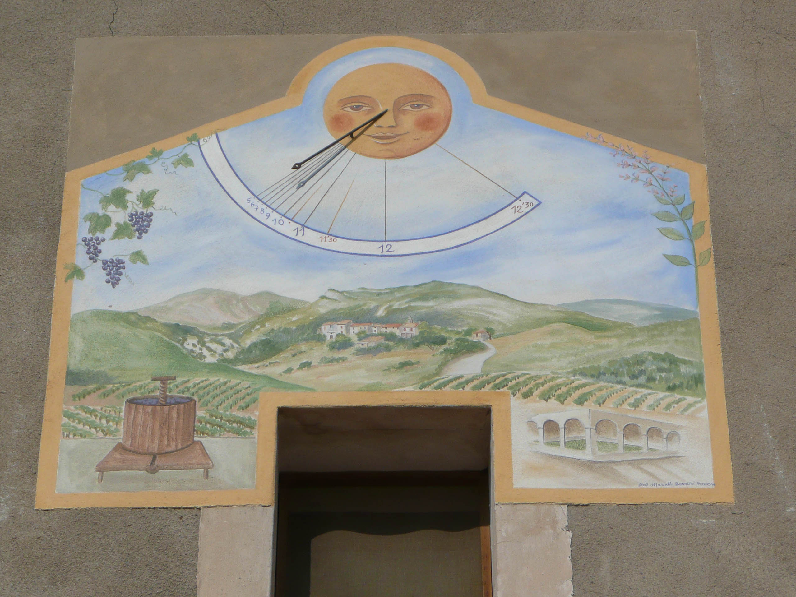 Cadran solaire à Saint-Jacques